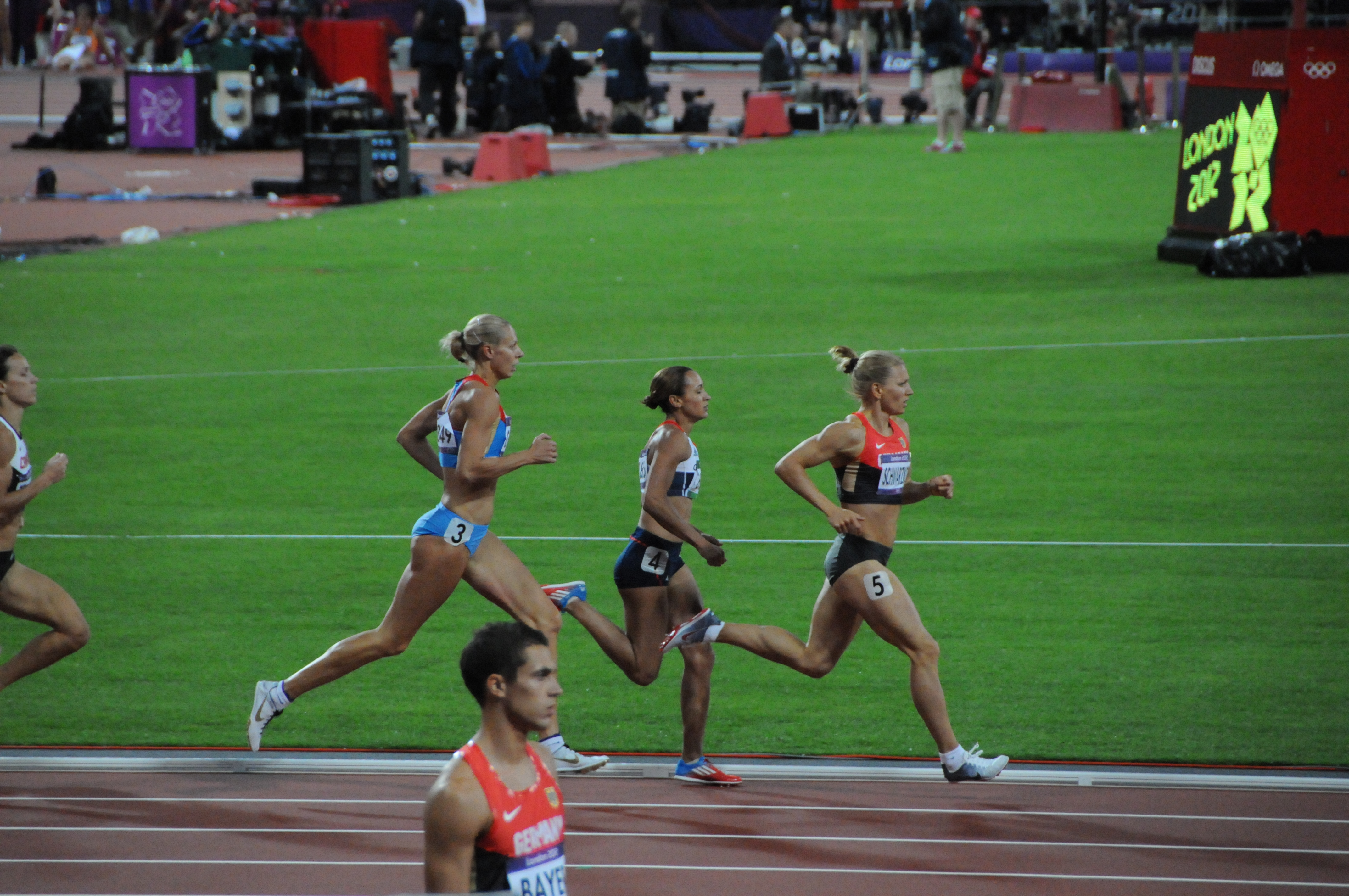 Jessica Ennis, au 800m, championne de l'’heptathlon aux JO de Londres